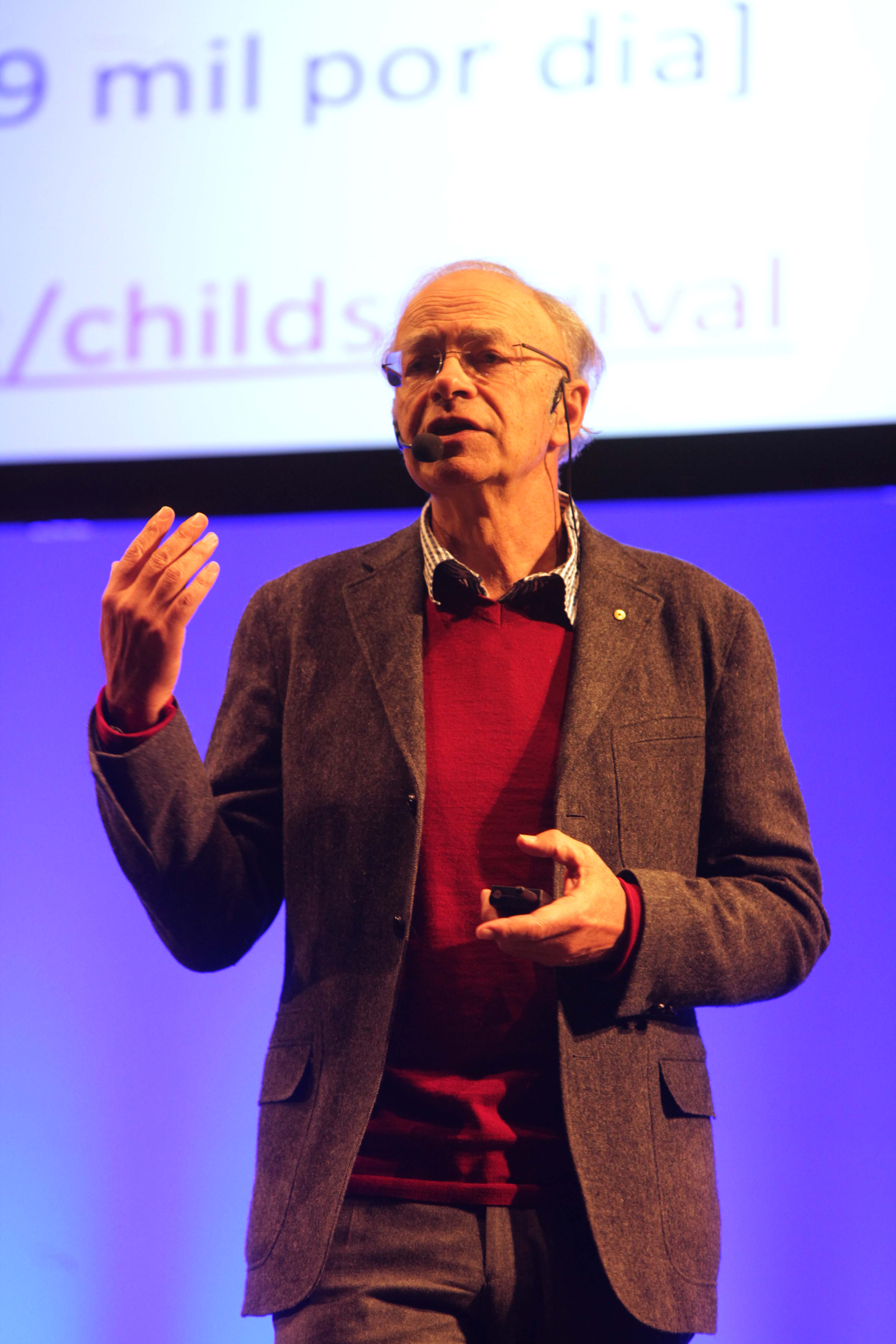 Peter Singer no Fronteiras do Pensamento São Paulo 2013